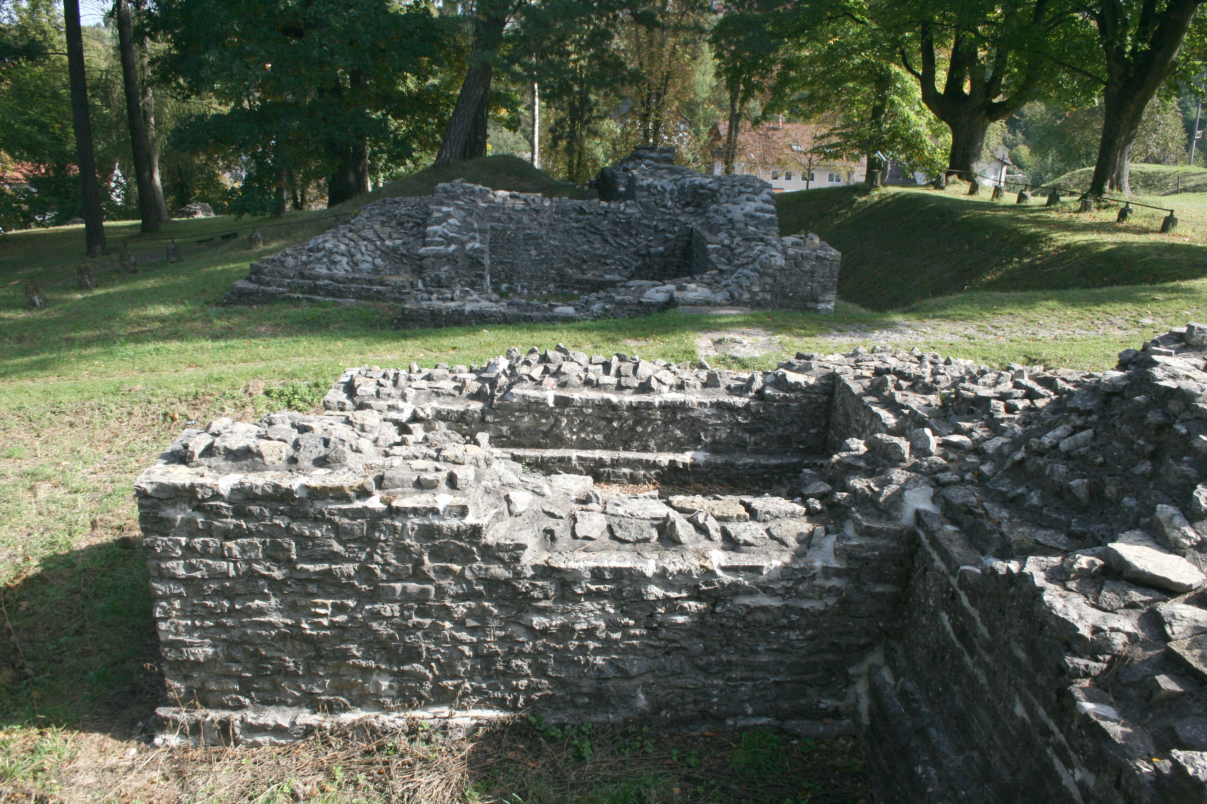 Kastell Osterburken: Südöstliches Tor des Annexkastells.